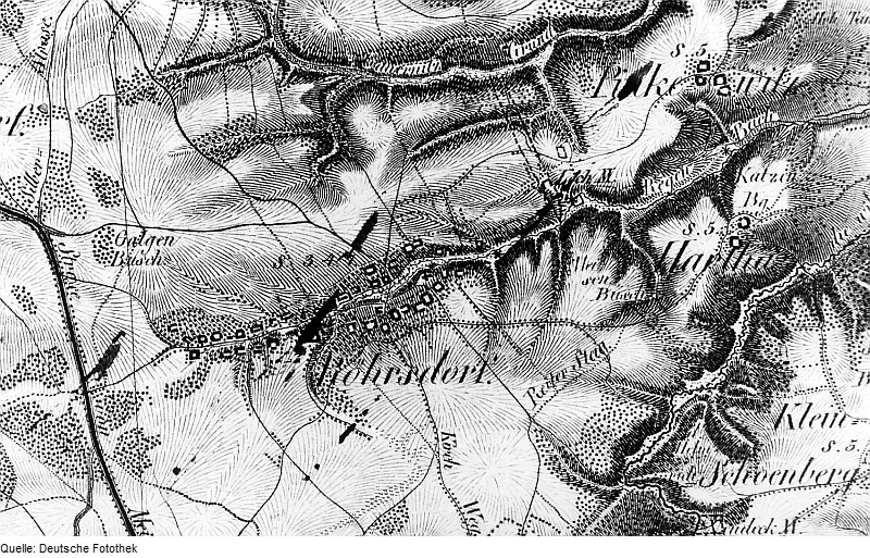 Original image description from the Deutsche Fotothek Klipphausen-Röhrsdorf. Oberreit, Sect. Dresden, 1821/22